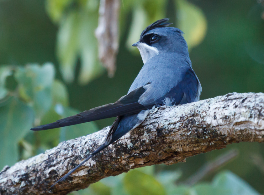 Hemiprocne coronata female